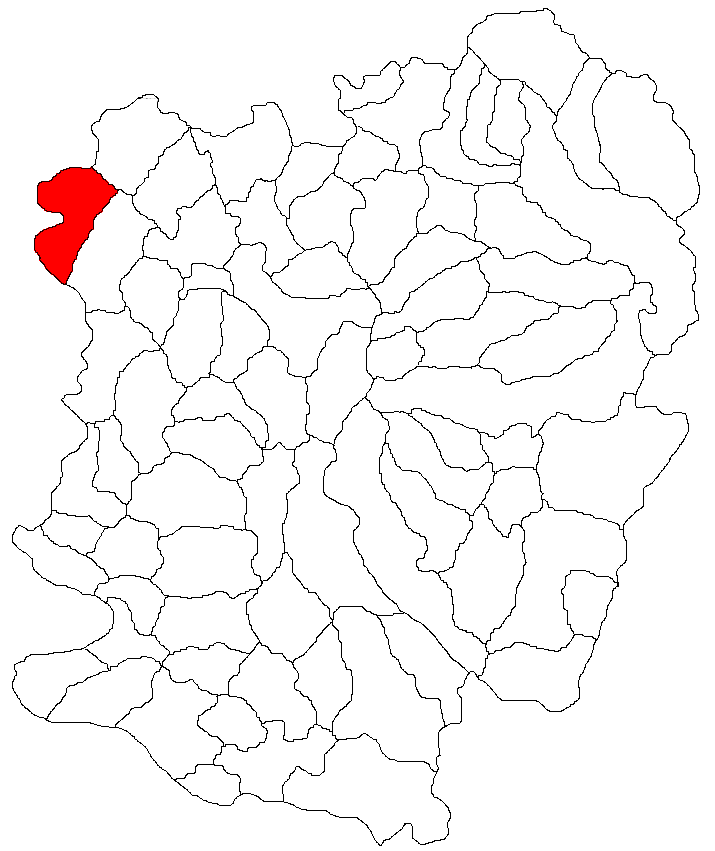 Categorie:Hărţi ale judeţului Caraş-Severin